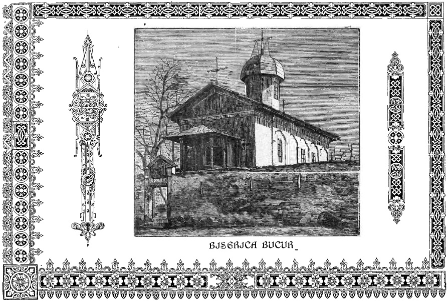 Biserica Bucur - gravura de epoca